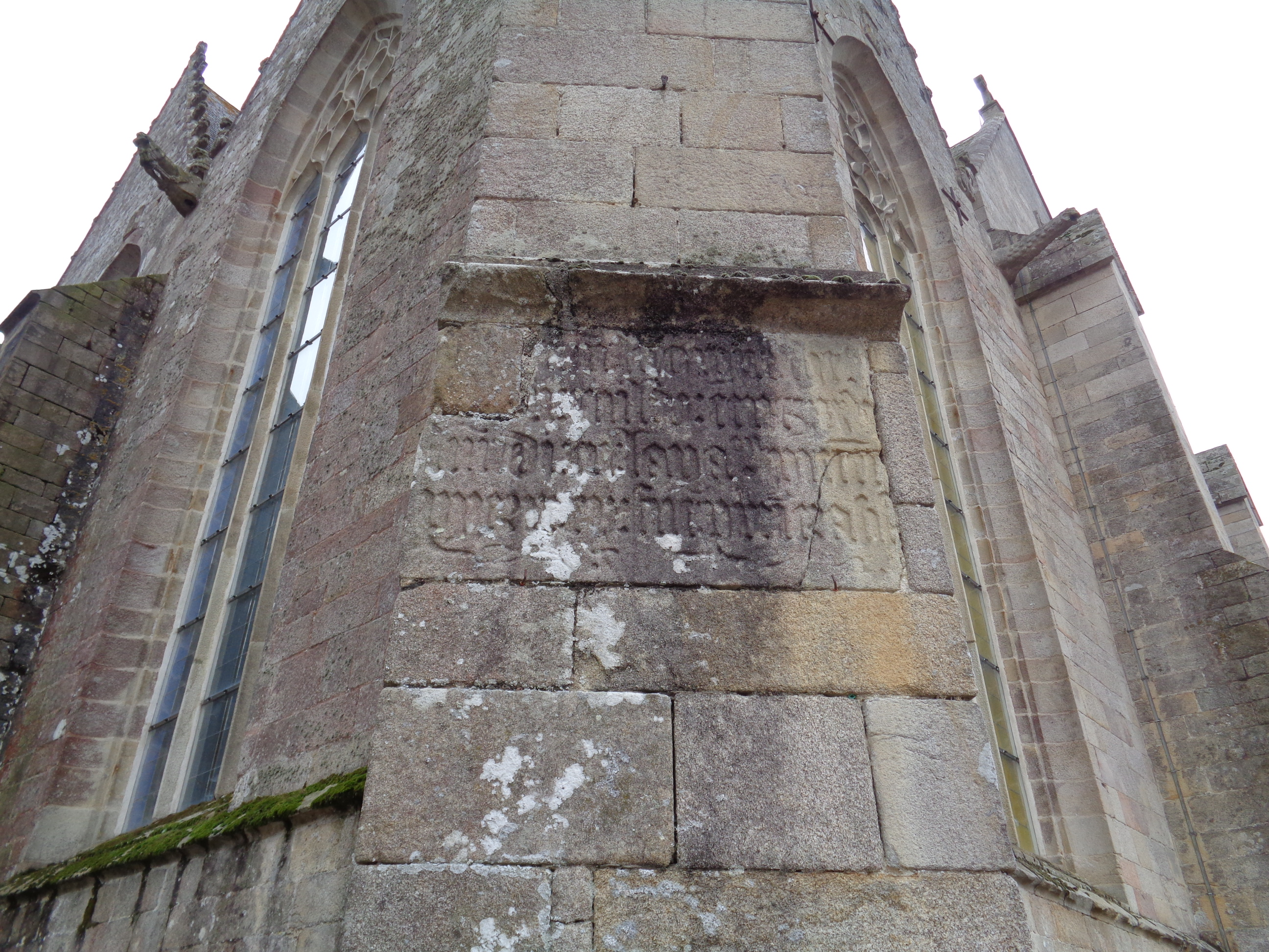 Inscription sur le contrefort nord-ouest datée de 1514[1]